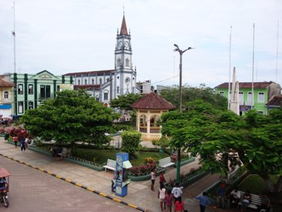 La Plaza de Armas de la Ciudad de Yurimaguas, Loreto, Perú